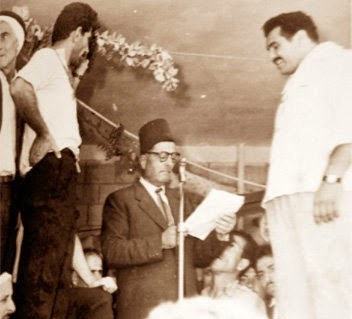 ابو أحمد - عبد اللطيف محمد بيضون (1909 – 1984)، سياسي لبناني، ونائب سابق في البرلمان اللبناني. وهو من بنت جبيل العاملية